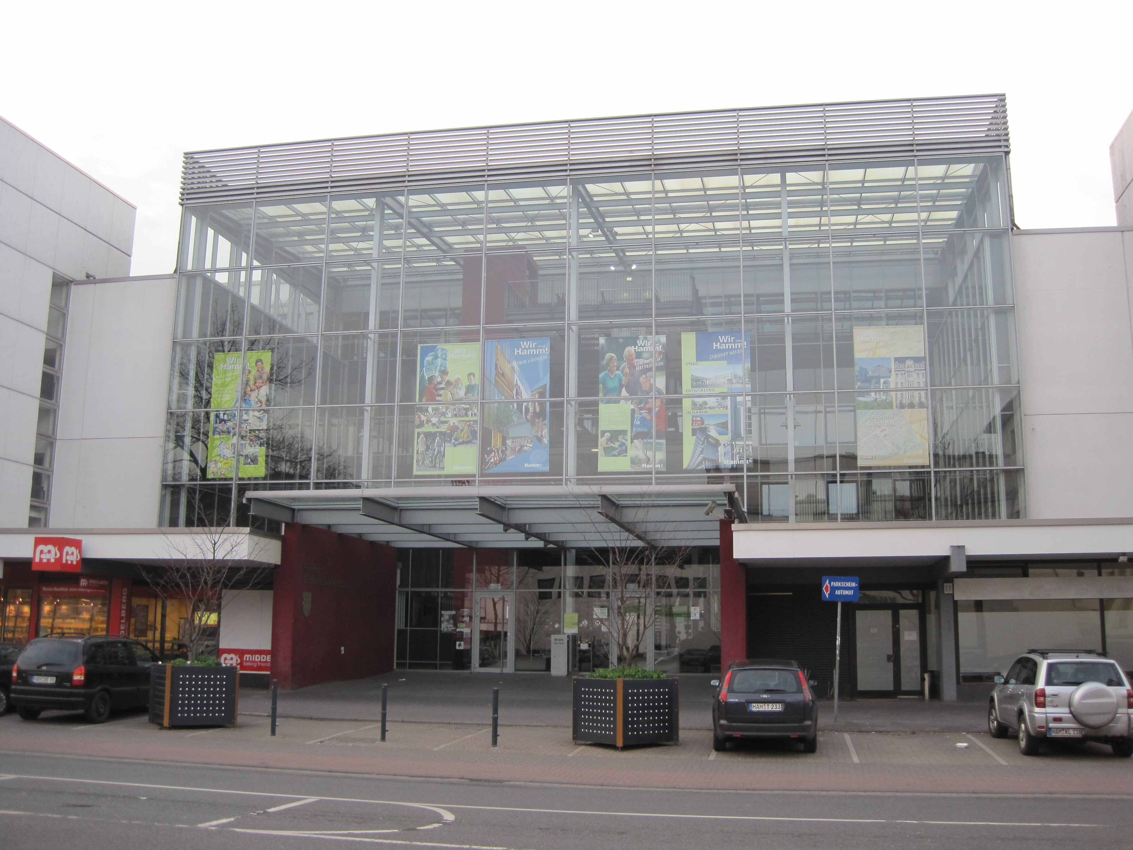 Das Foto zeigt den Eingangsbereich des Technischen Rathauses von Hamm.